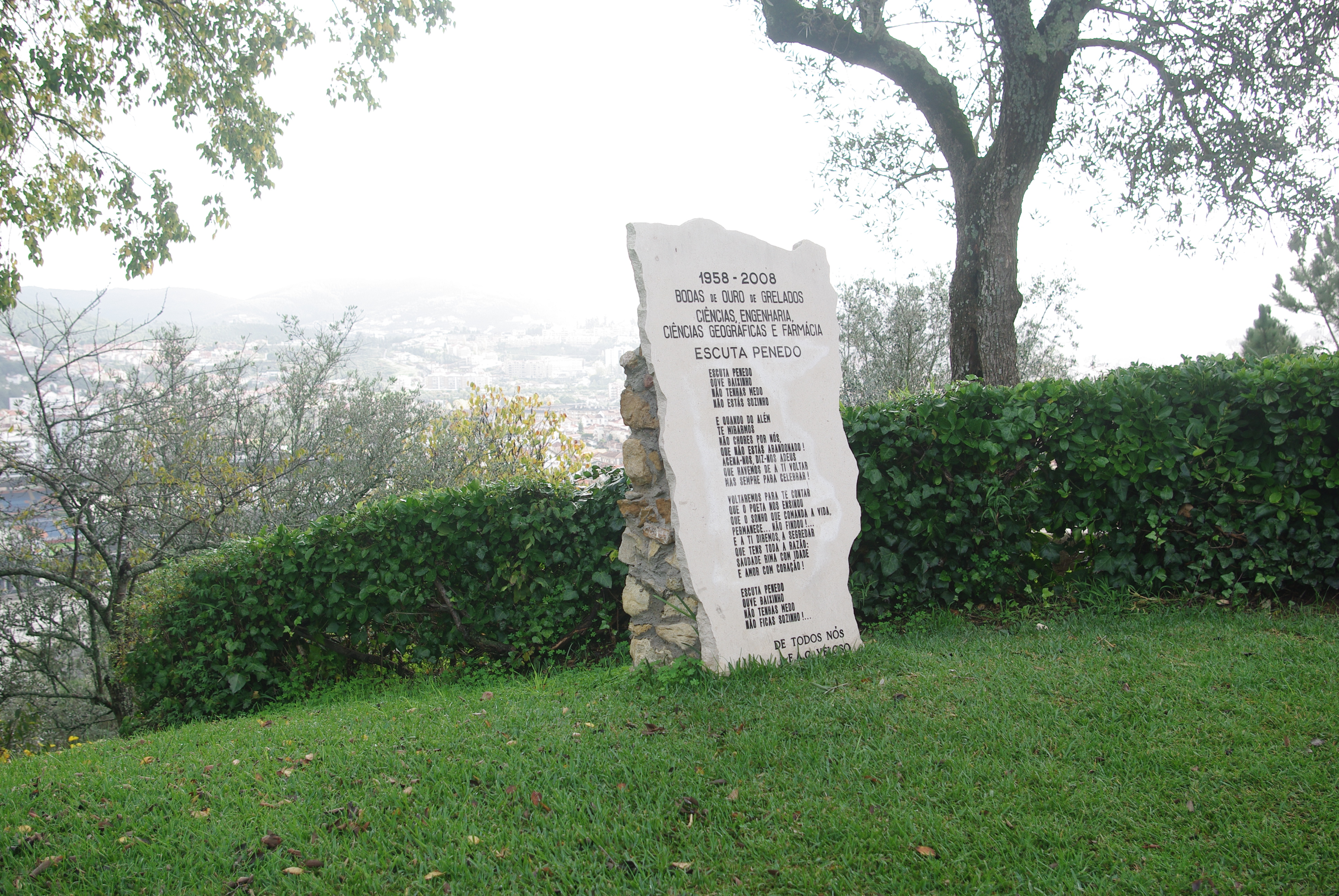 Penedo da Saudade, em Coimbra. Na superfície da pedra, encontra-se gravado um poema de F.A.C. Veloso, Escuta Penedo.